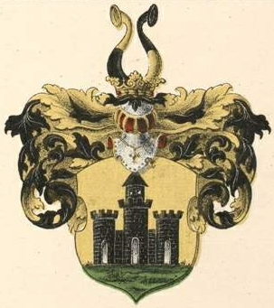 Patkuli suguvõsa aadlivapp